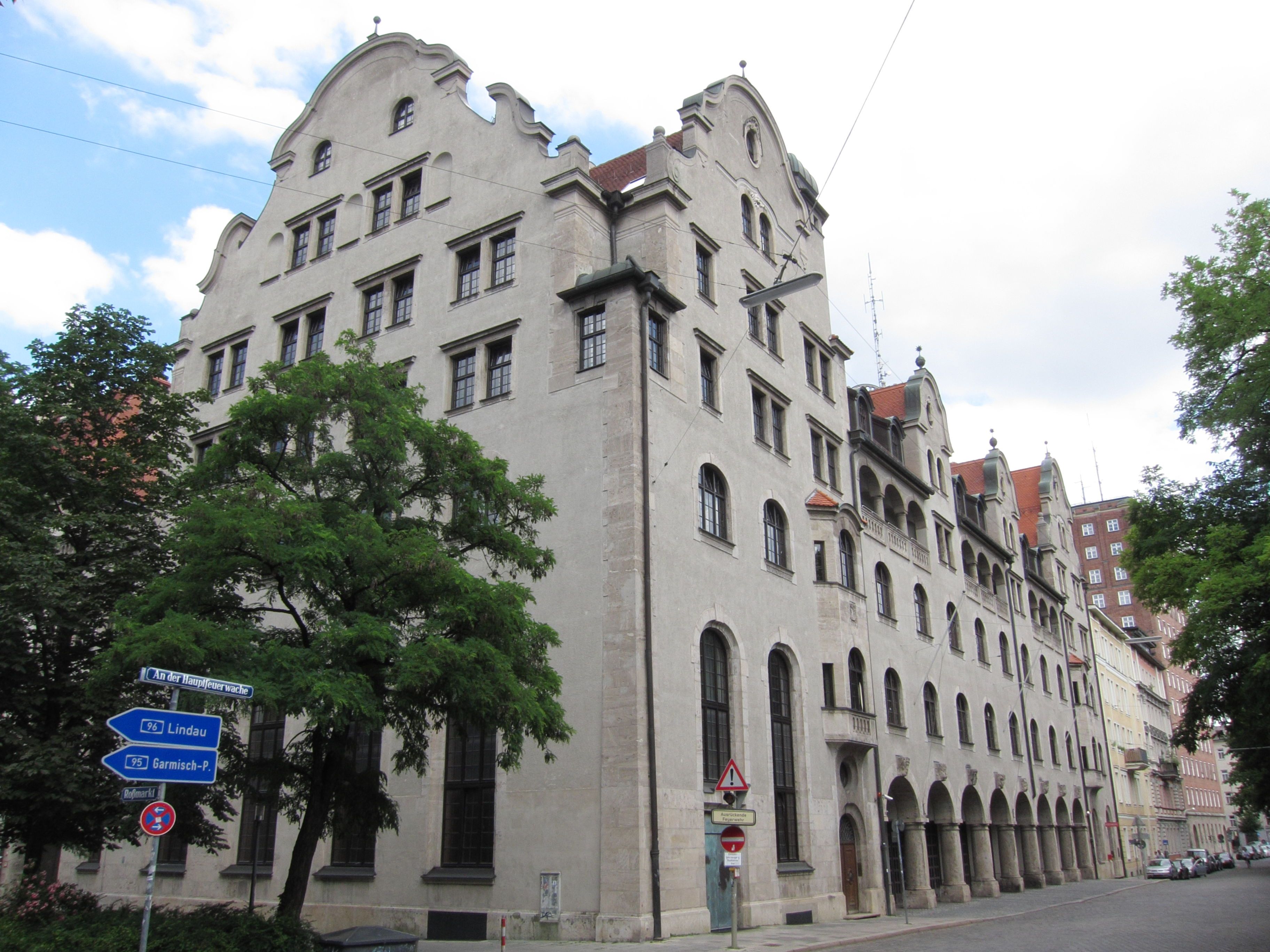 An der Hauptfeuerwache 8; Hauptfeuerhaus, fünfgeschossiger malerischer Eckbau in barockisierendem Jugendstil, mit Arkadenvorhalle und Loggienausbildung im Obergeschoss, die Zwerchhäuser mit barockisierenden Schweifgiebeln, von Karl Hocheder d. Ä. und Robert Rehlen, 1902-04